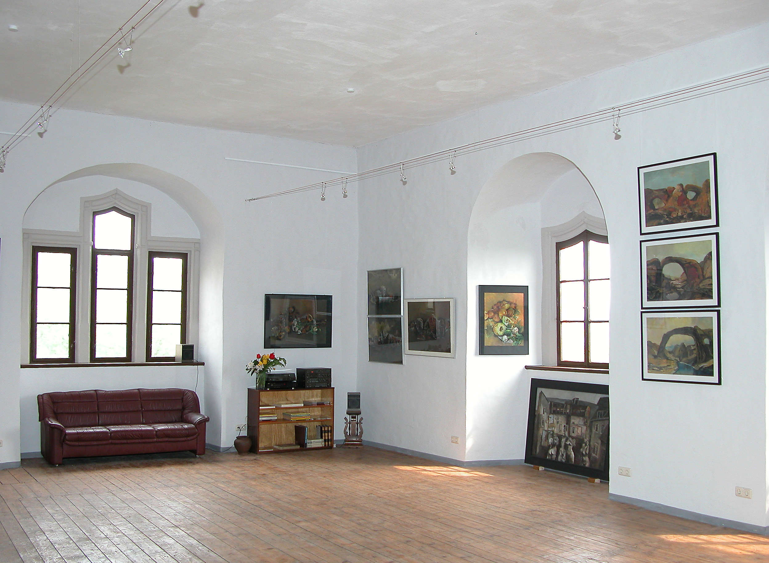 06.05.2006 09669 Sachsenburg (Frankenberg) Am Schloß 1 (GMP: 50.932797,13.029747): Schloß Sachsenburg (erste Nennung 1289). Heutiger Bau aus der Spätgotik. Raum am Wendelstein im 1. OG des Ostflügels mit der Ausstellung des Malers Leo Lessig. [DSCN9891.TIF]20060506240DR.JPG(c)Blobelt